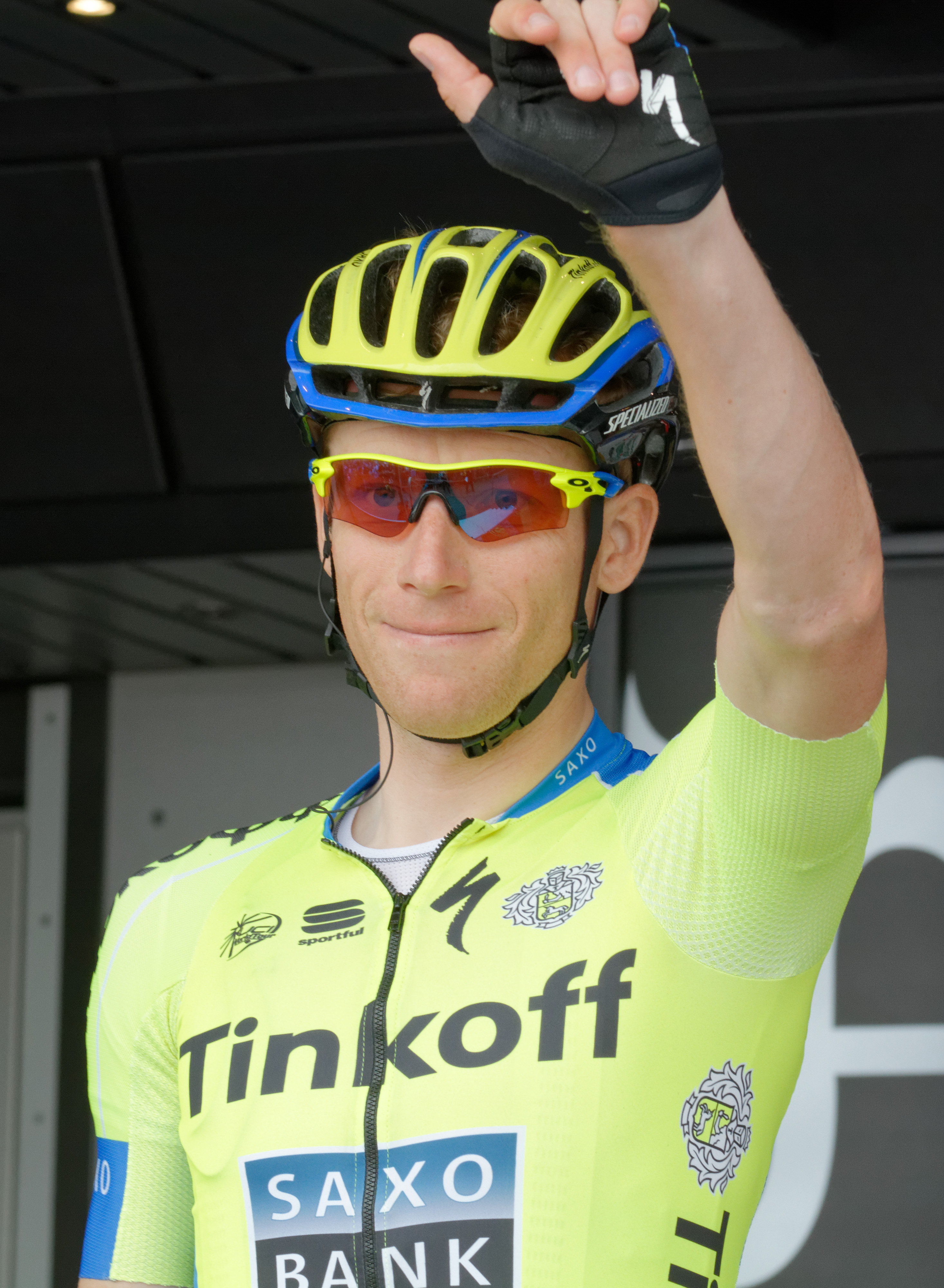 D71_9894_DxO